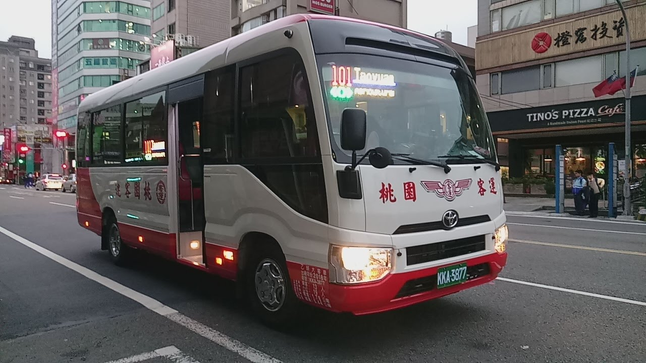 中文（台灣）: 桃園客運KKA-3877